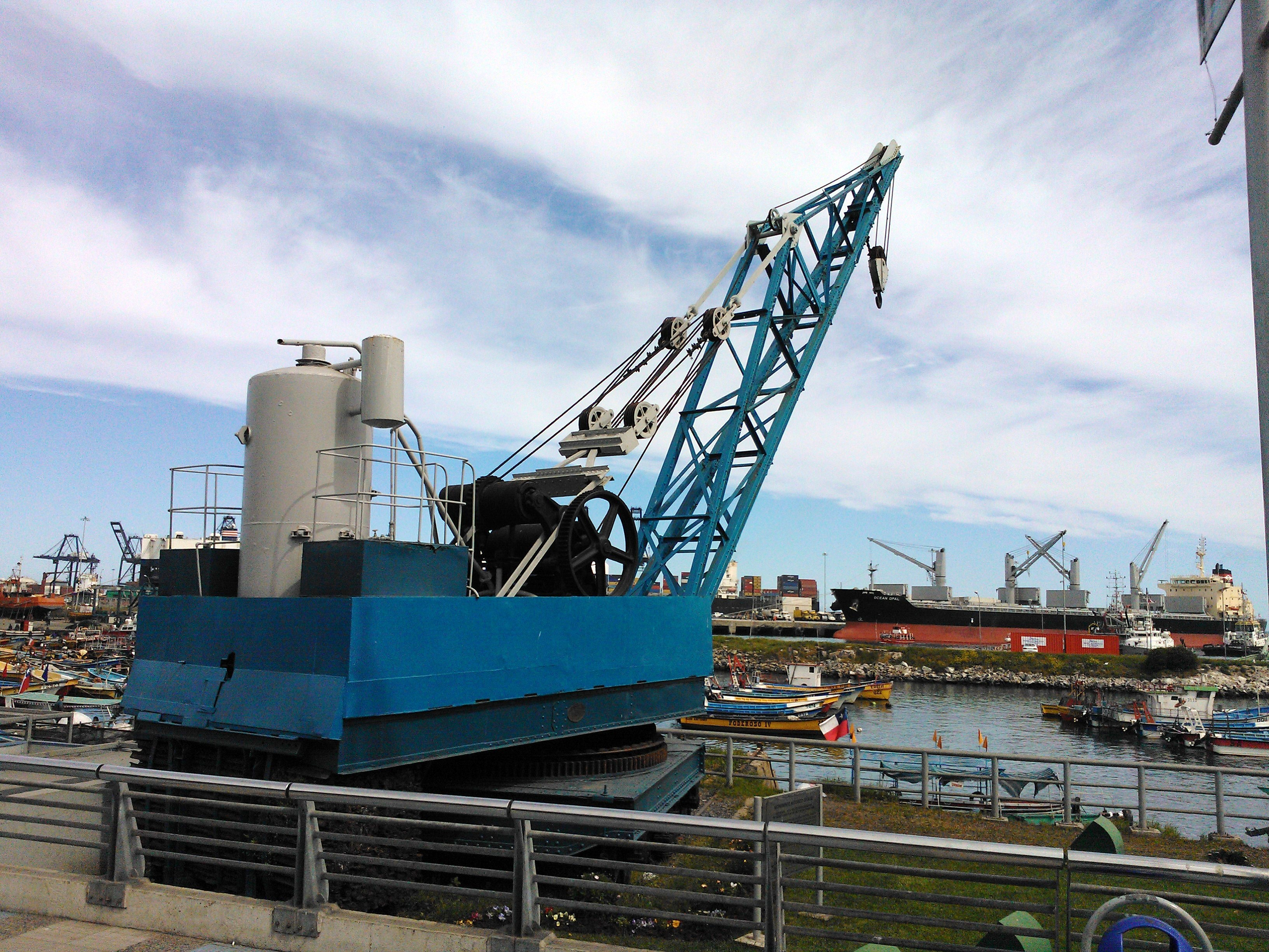 Grúa 82 This is a photo of a national monument in Chile: 632